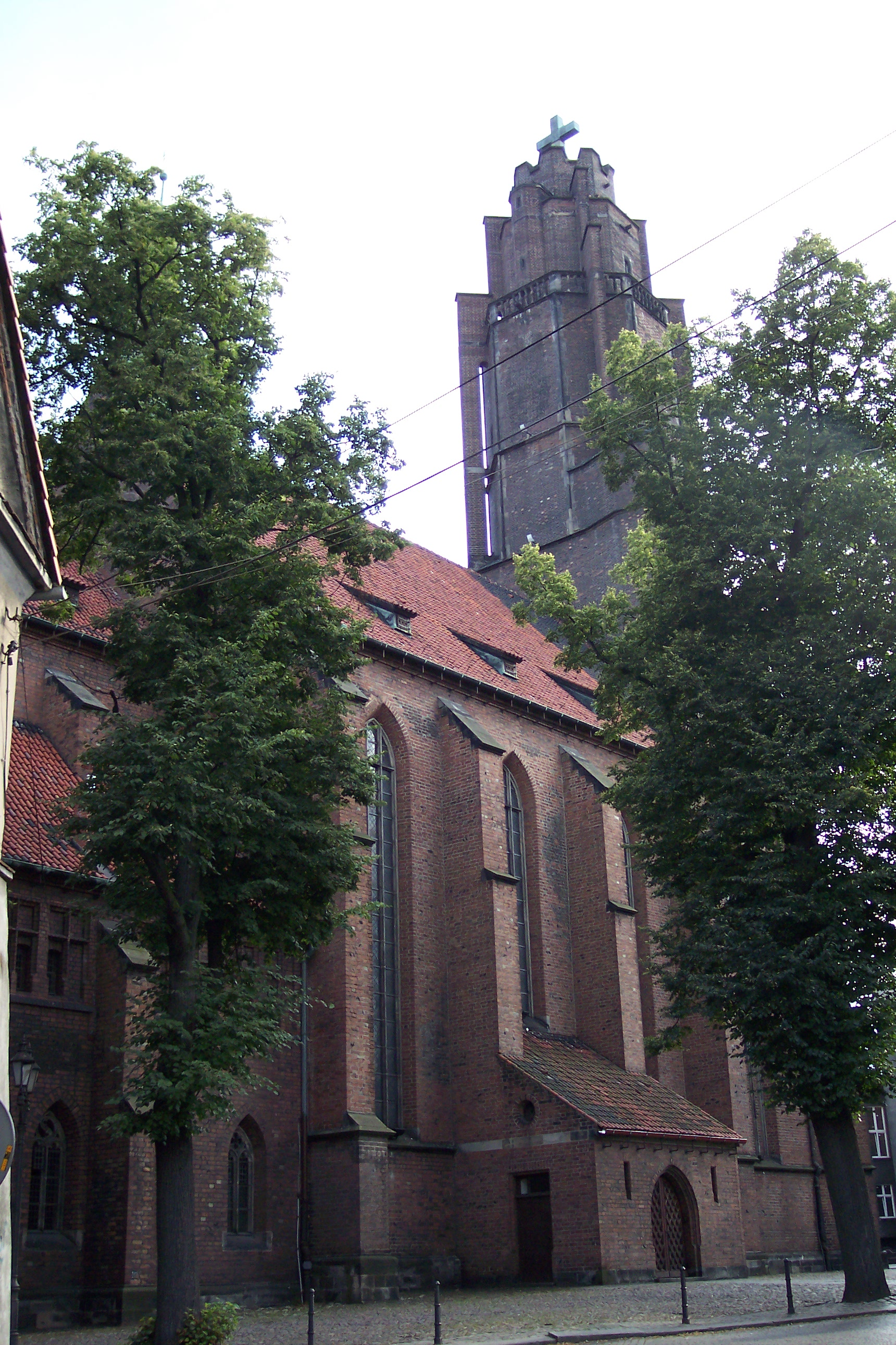 Kościół Wszystkich w Gliwicach